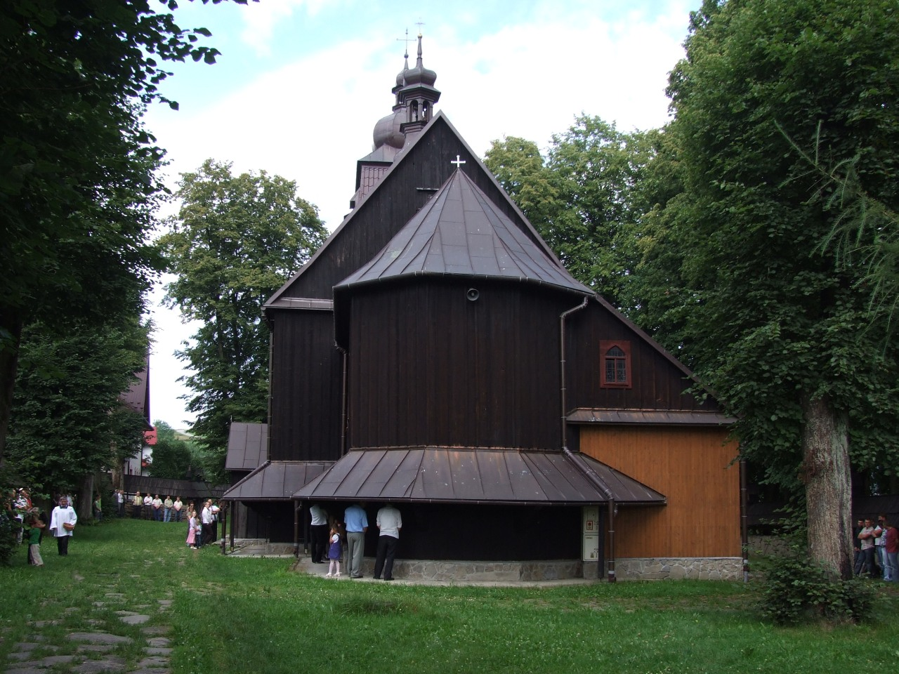 Preĝejo en Lubomierz